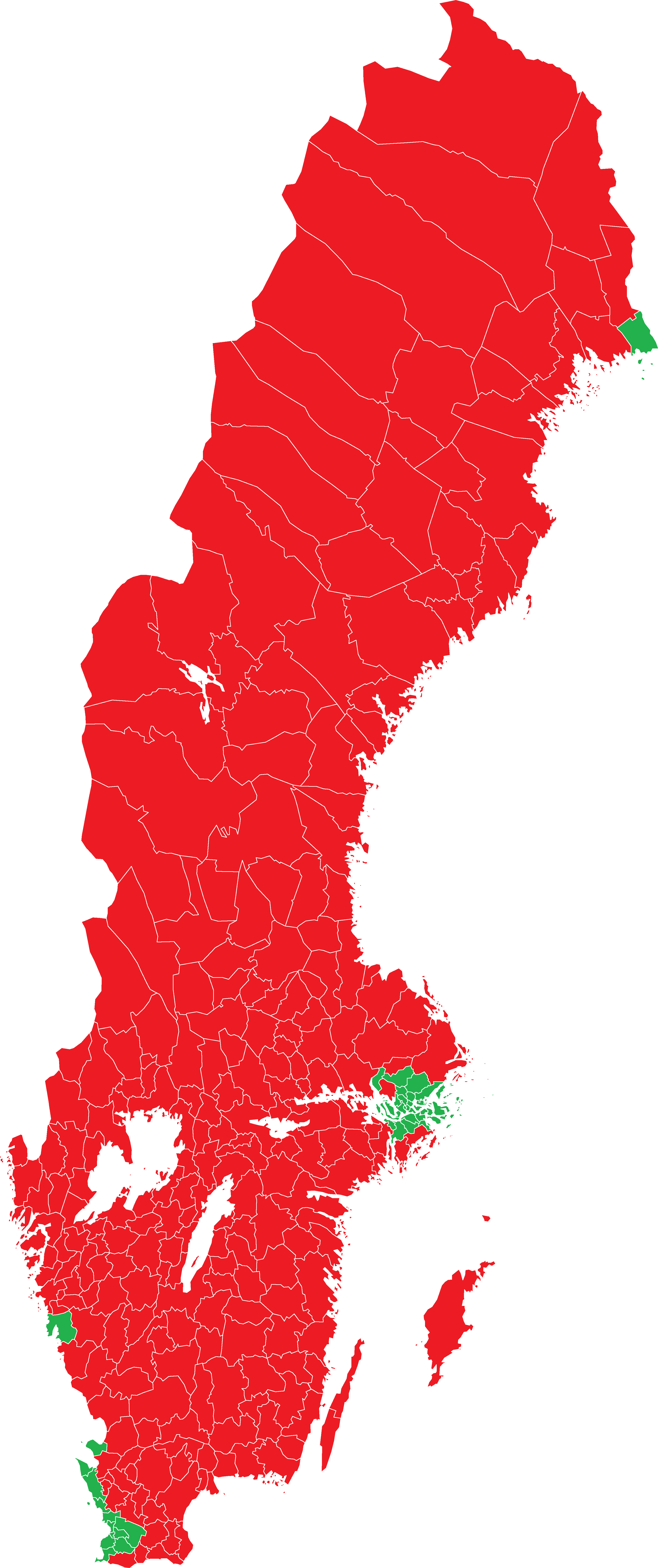 Valresultat per kommun i folkomröstningen om medlemskap i Ekonomiska och monetära unionen (EMU). Grönt är ja och rött är nej.